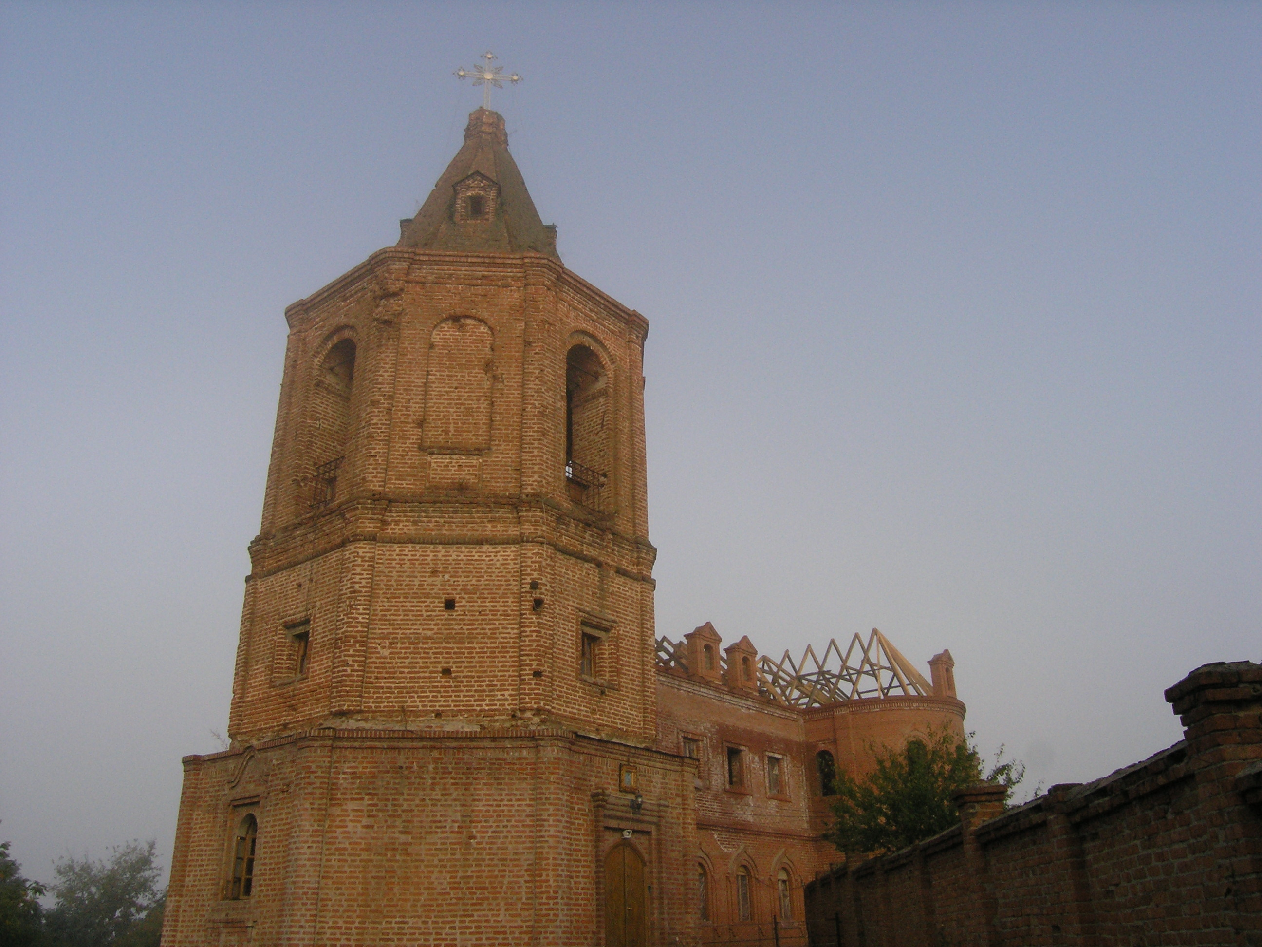 Охтирський Троїцький монастир, Охтирський район, с. Чернеччина.